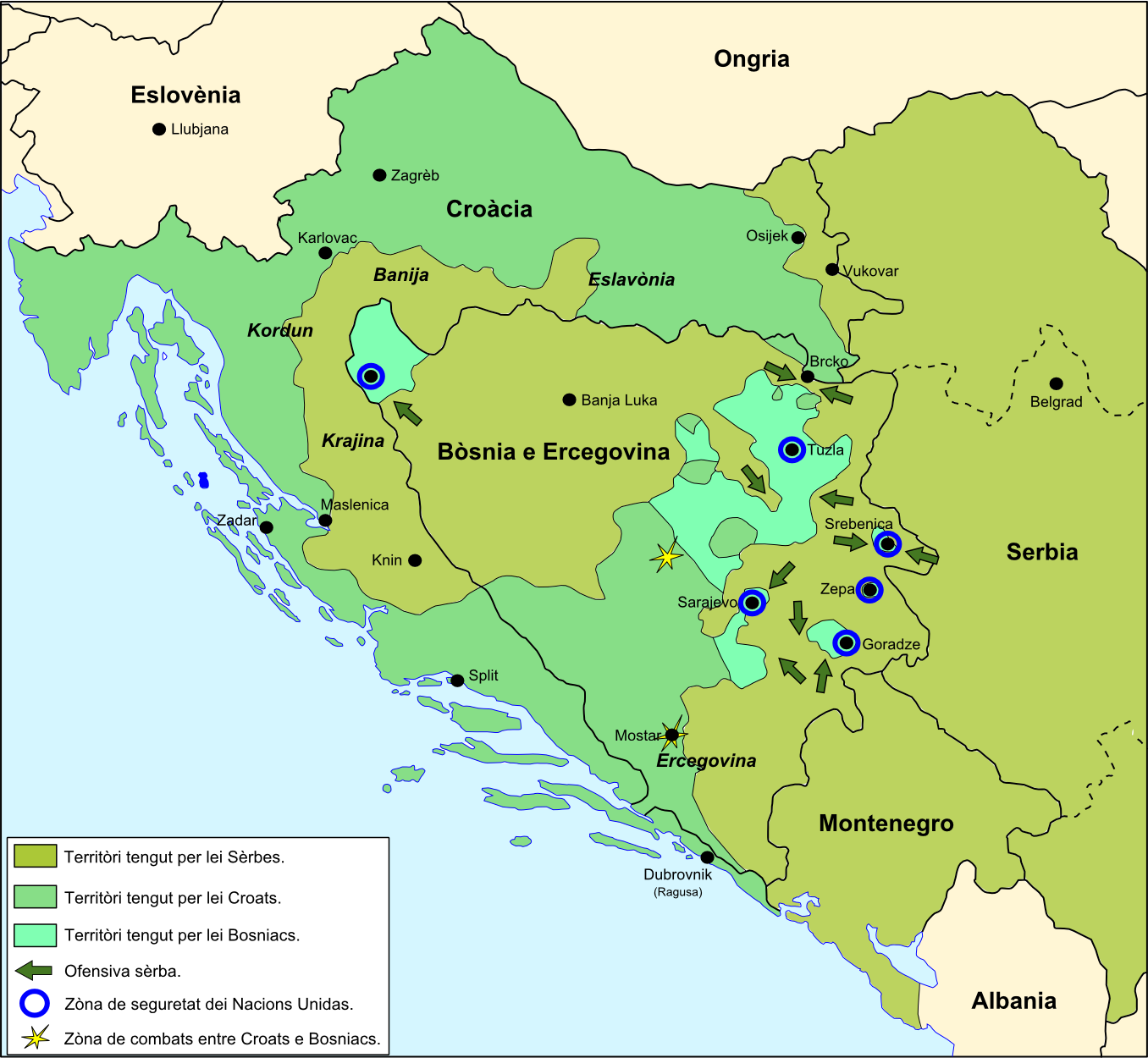 Guèrras de Iogoslavia en mai de 1993.